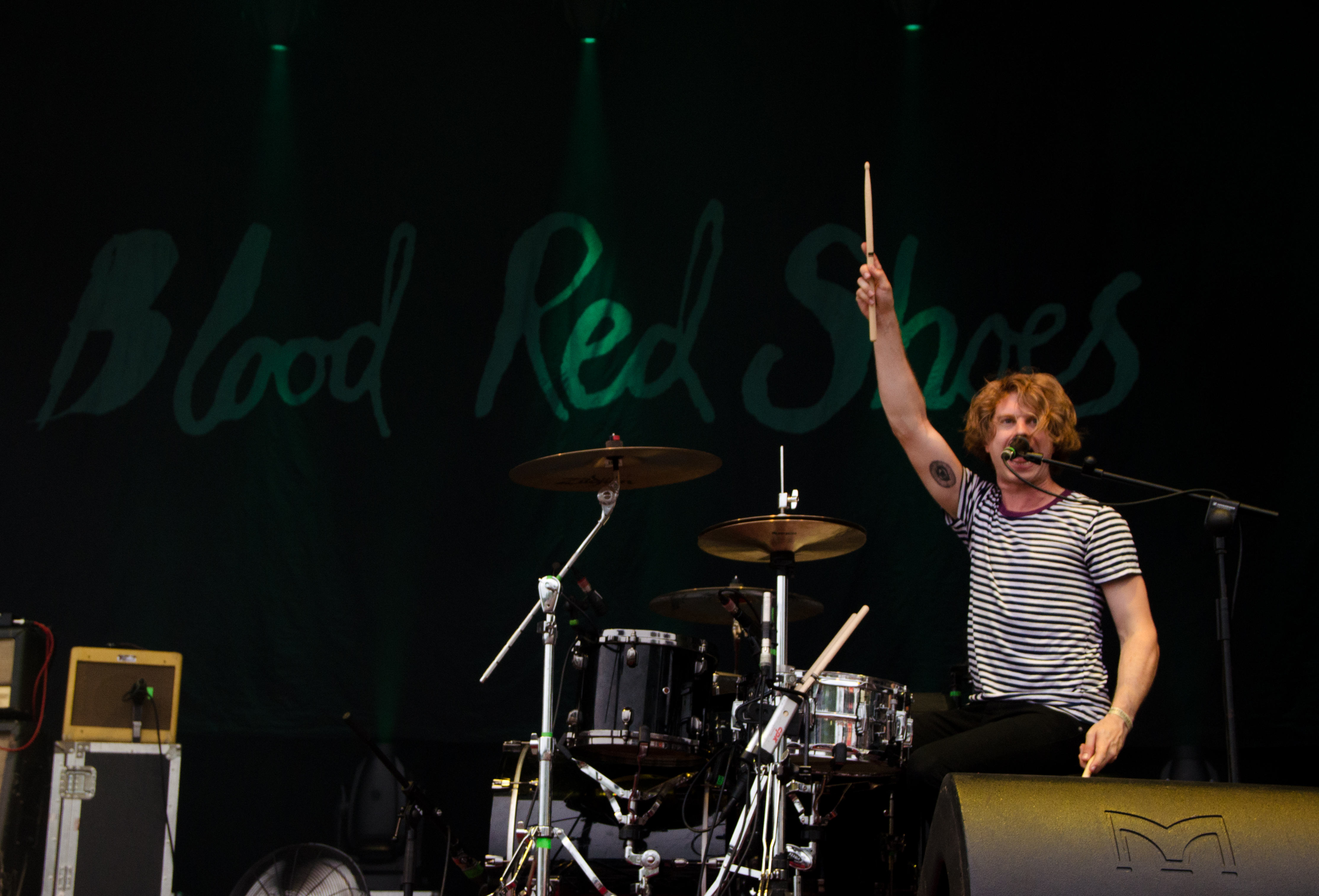 Steven Ansell, von der Band Blood Red Shoes auf dem Kosmonaut Festival 2014 in Chemnitz Oberrabenstein.